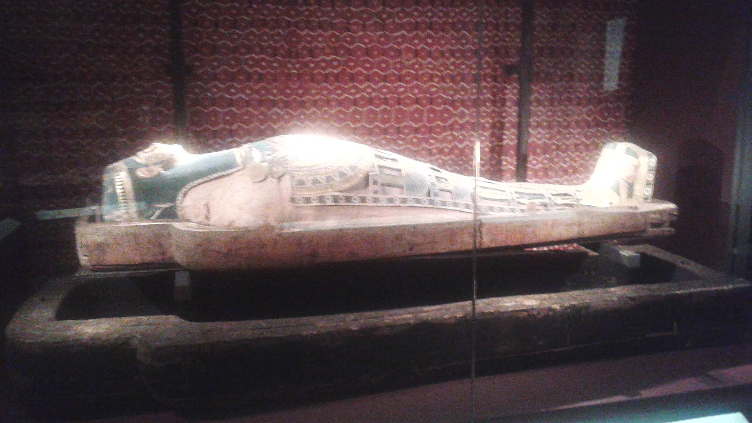 Mumien av Neswaui. Pärlstycke och mask innanför de två kistlocken.